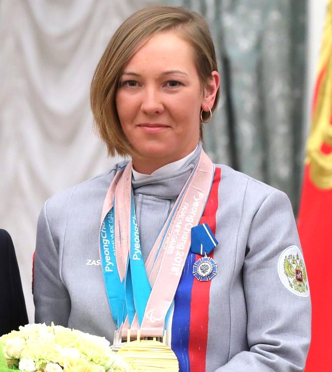 Президент России Владимир Путин с чемпионом Игр по лыжным гонкам и биатлону Анной Милениной